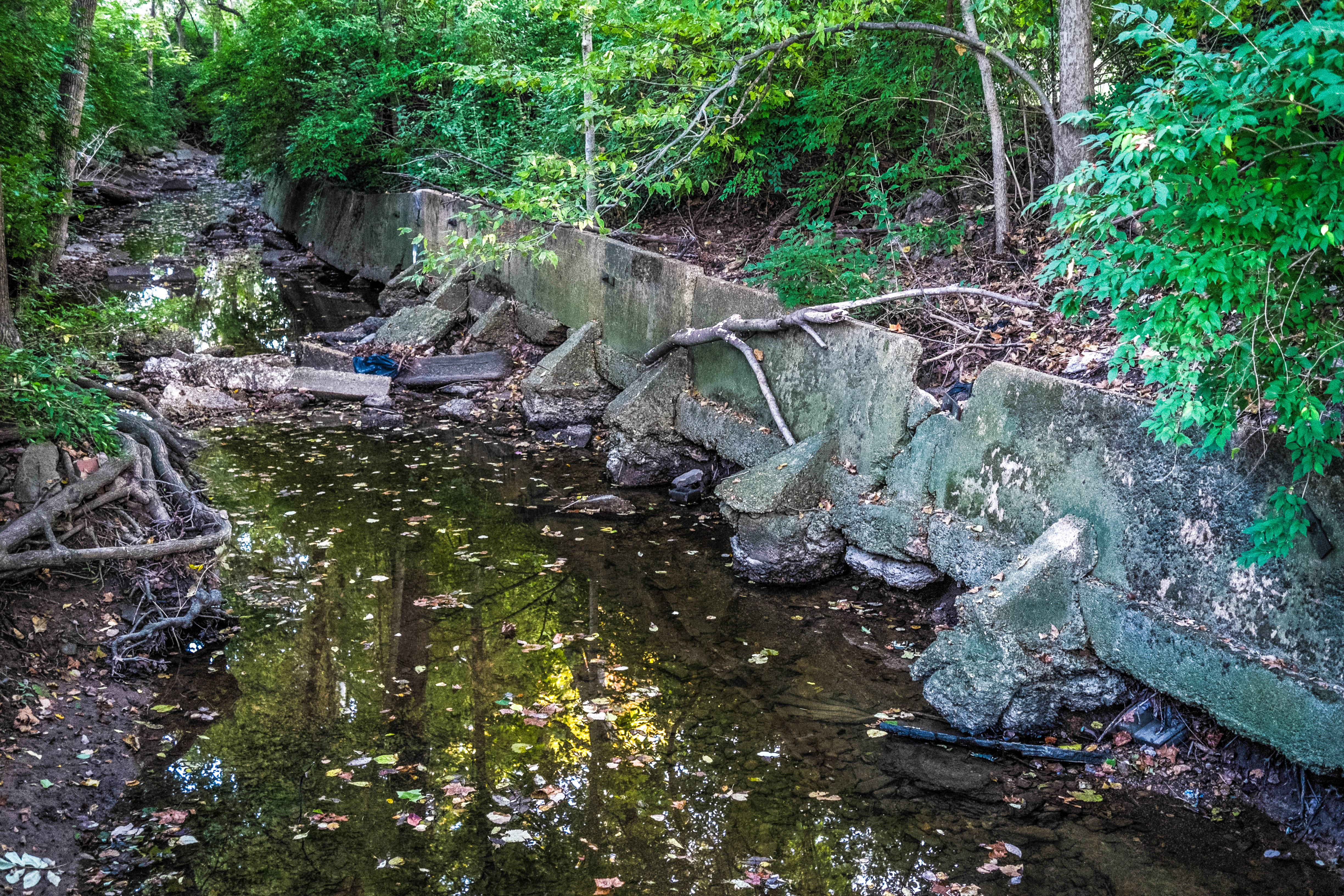 Deer Creek in Creve Coeur, Missouri